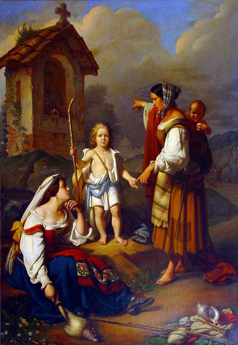 La zingara predice al futuro papa Sisto V l'ascesa al pontificato, olio su tela, 2,92 x 2.13 m., firmato e datato, Reggia di Caserta.